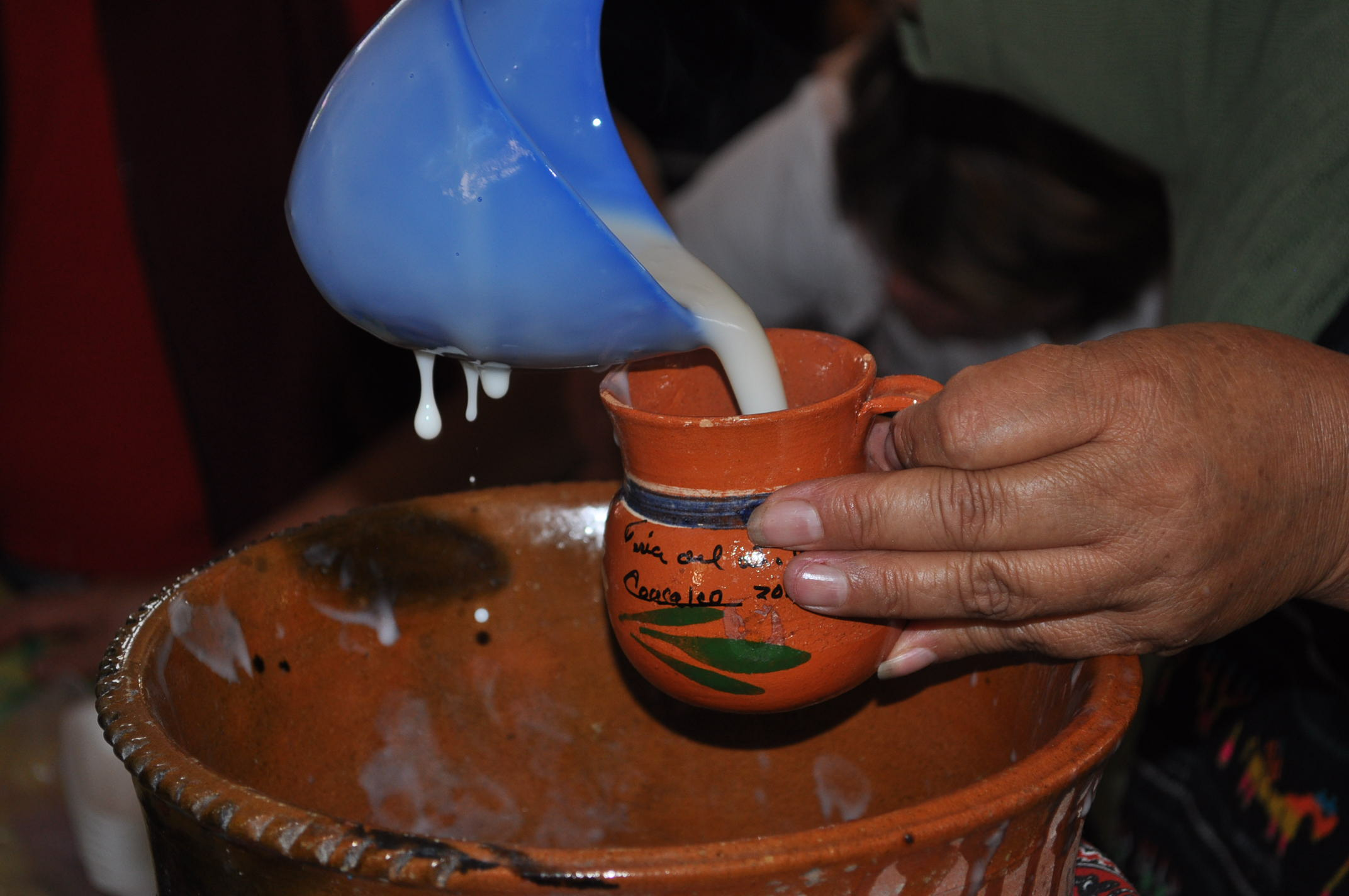 Feria del Atole Coacalco